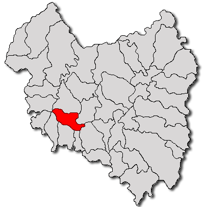 Categorie:Hărţi ale judeţului Covasna